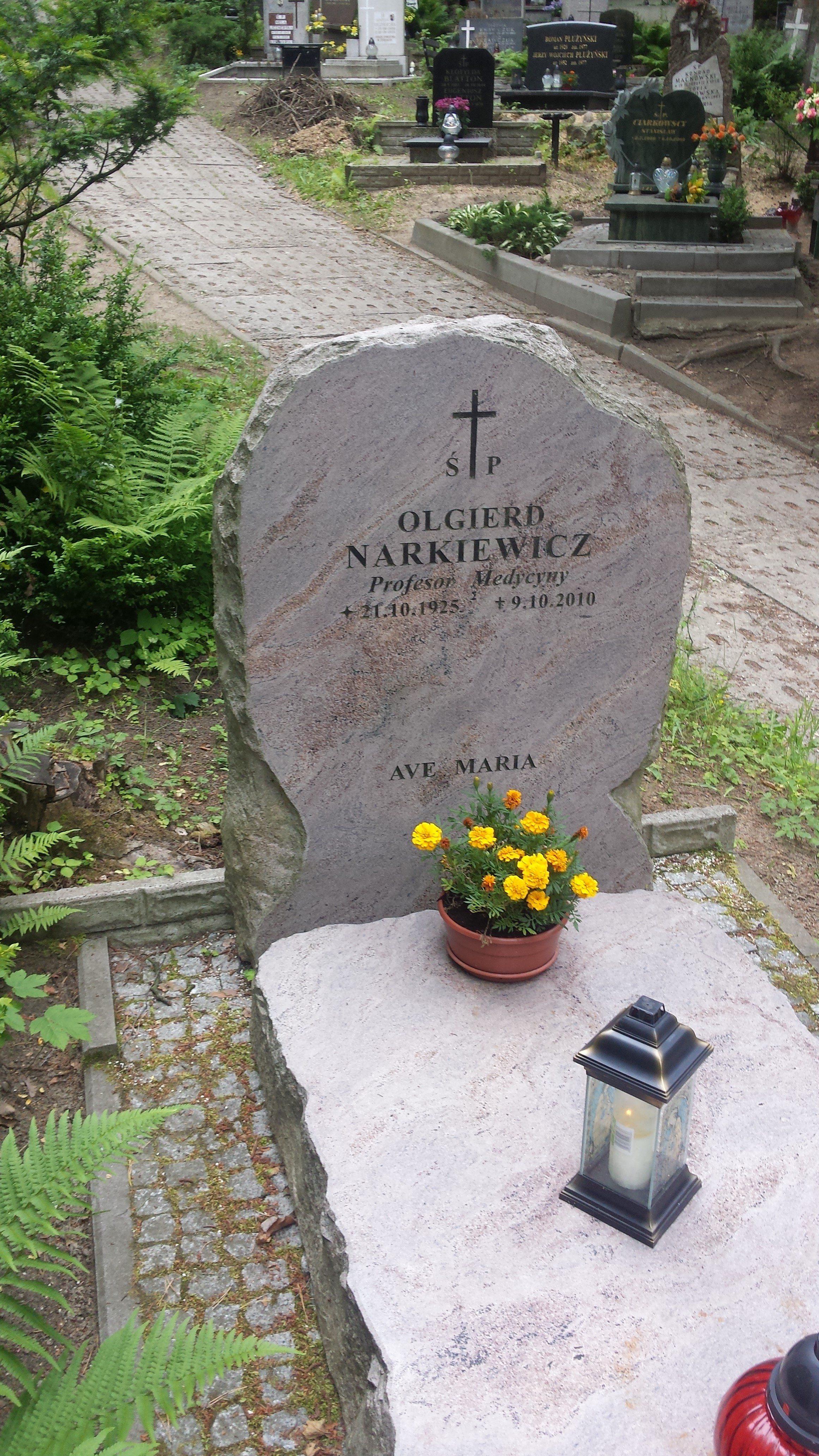 grób prof. Olgierda Narkiewicza na cmentarzu Srebrzysko w Gdańsku